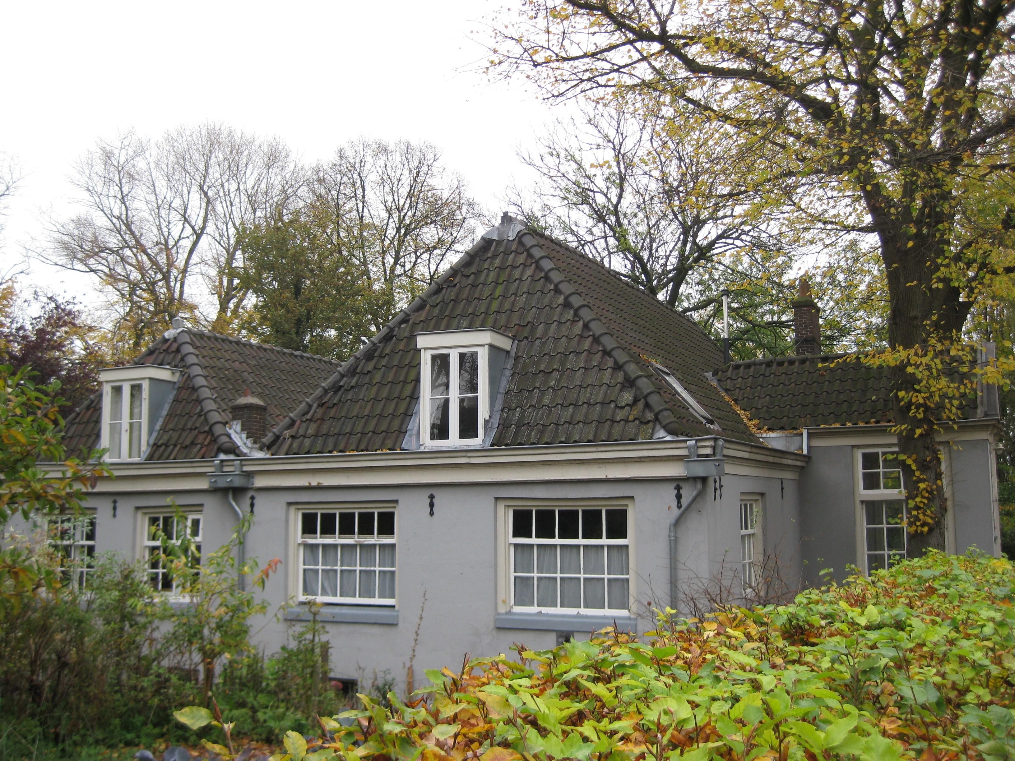 Zeeburgerdijk 633-641, Amsterdam-Oost